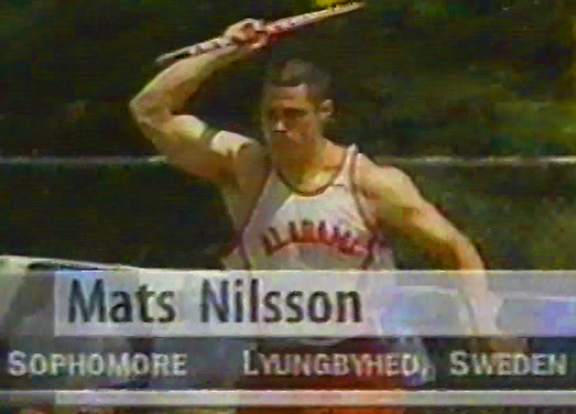 Mats Nilsson SEC Champs 1997